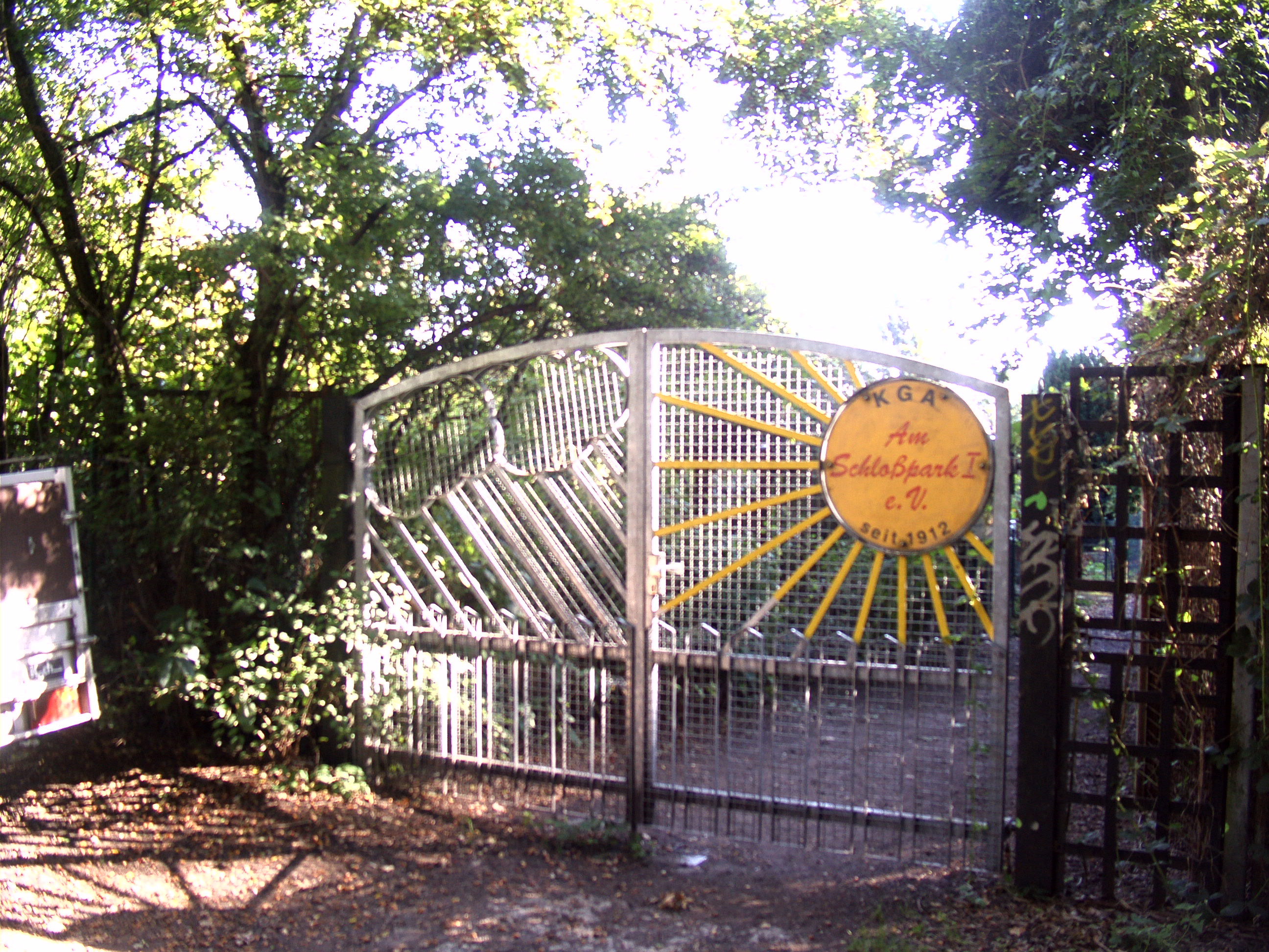 Eingangstor der Kleingartenanlage Am Schlosspark - Berlin-Pankow